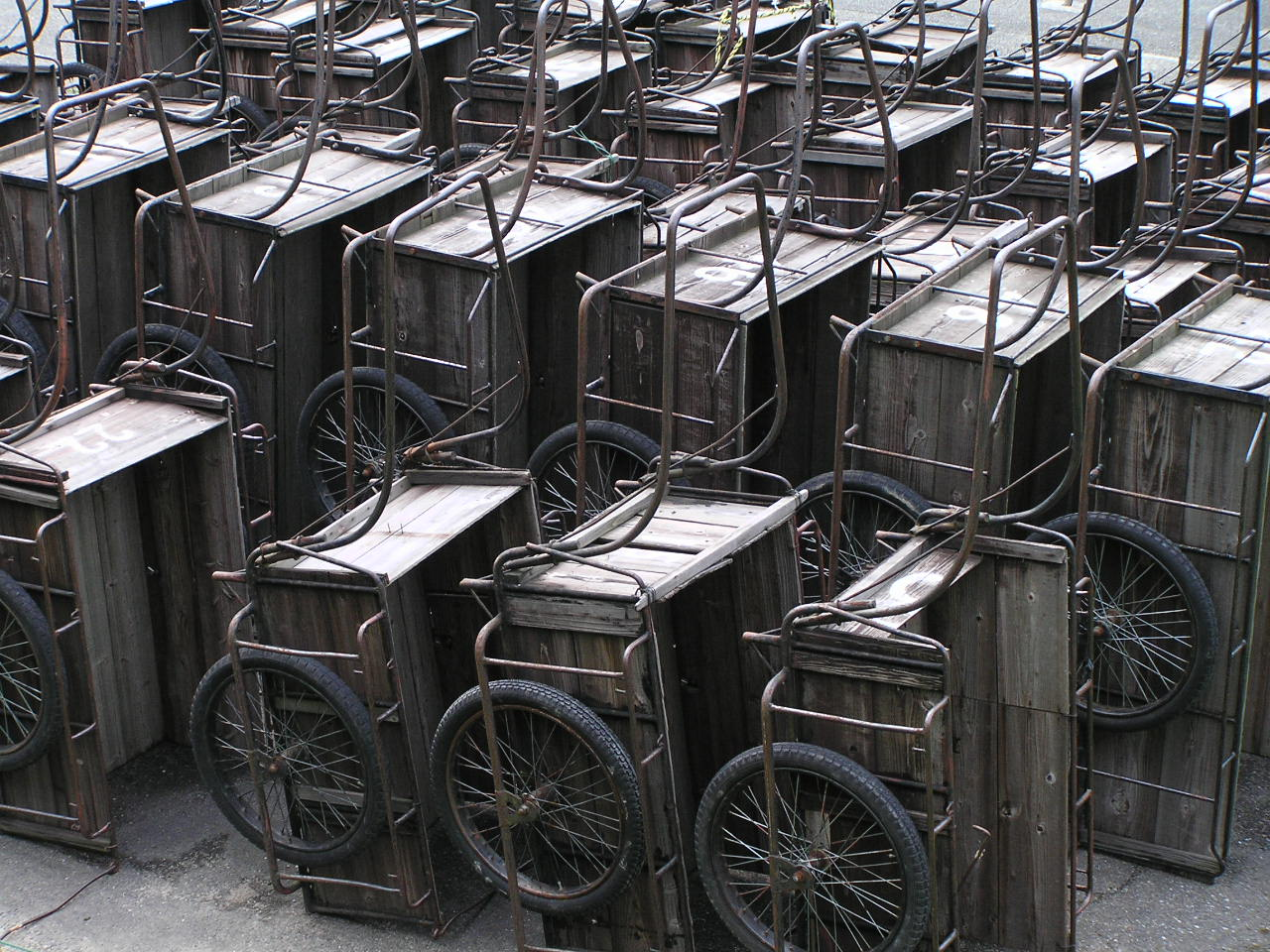 リヤカーの群れ。 ユニトピア篠山にて。 ～photo by Autumn Snake 【おぉたむすねィく探検隊】